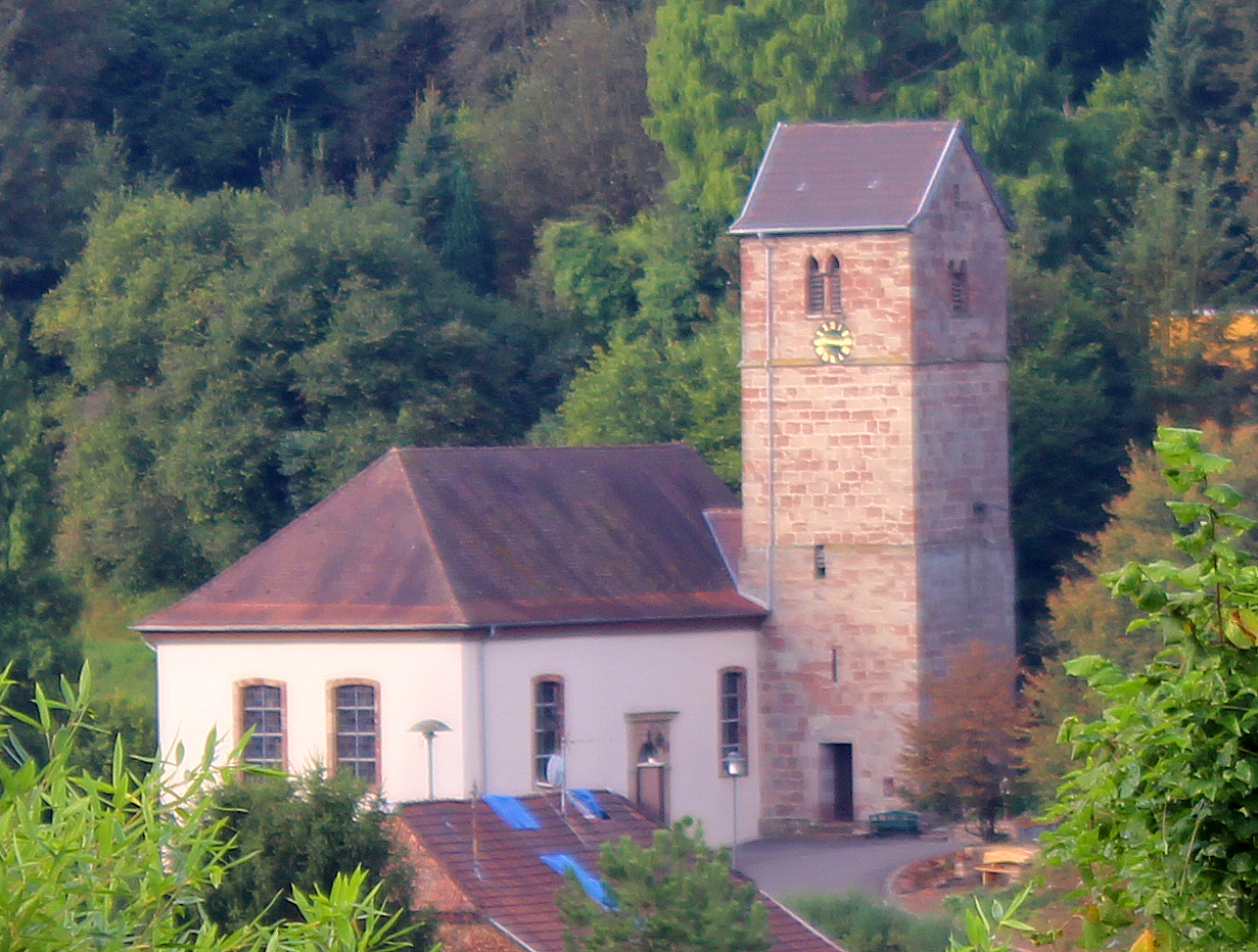 Die evangelische Kirche in Fechingen, Stadt Saarbrücken, Saarland